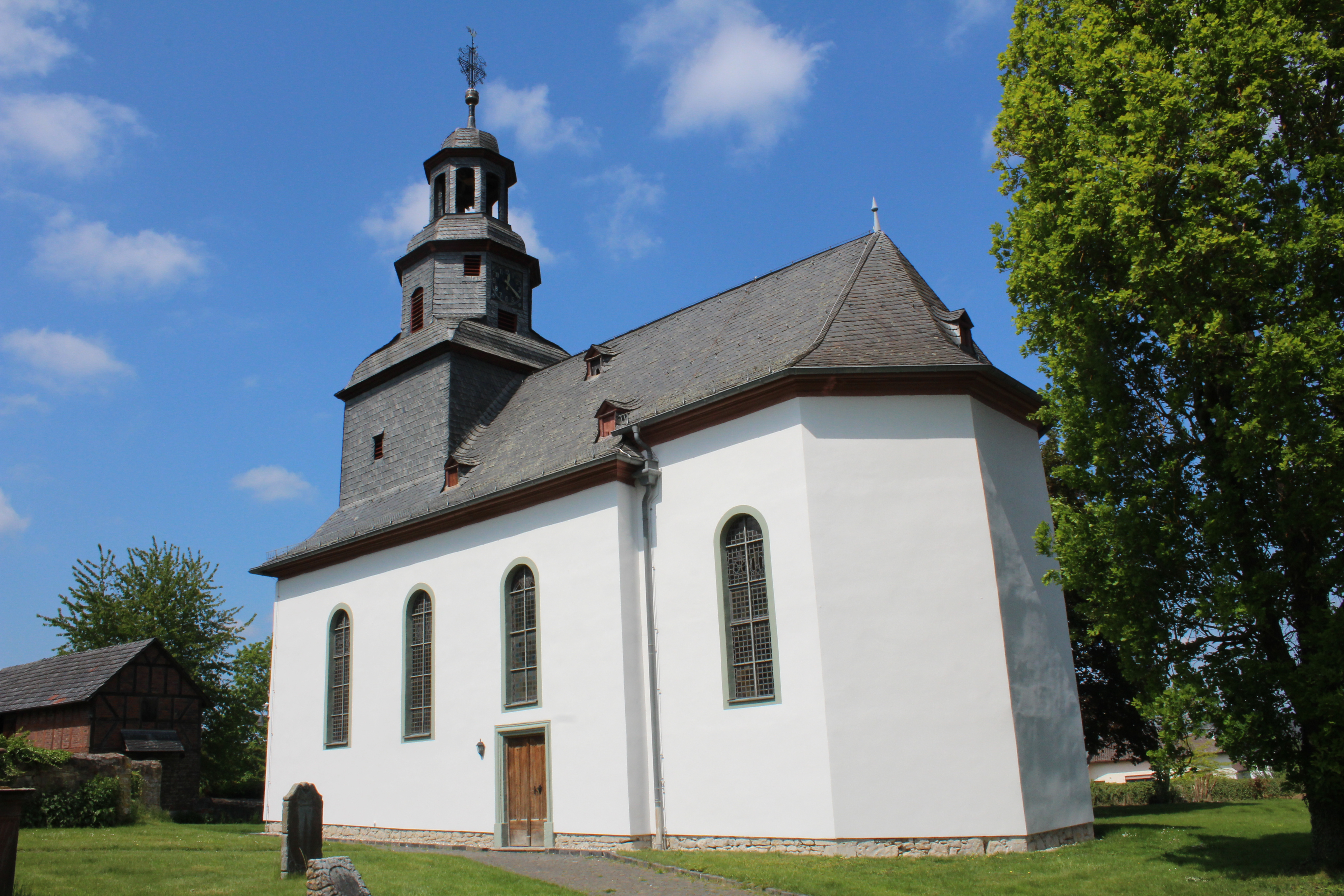 Ev. Kirche Niederkleen, Langgöns, Landkreis Gießen, Hessen, Deutschland